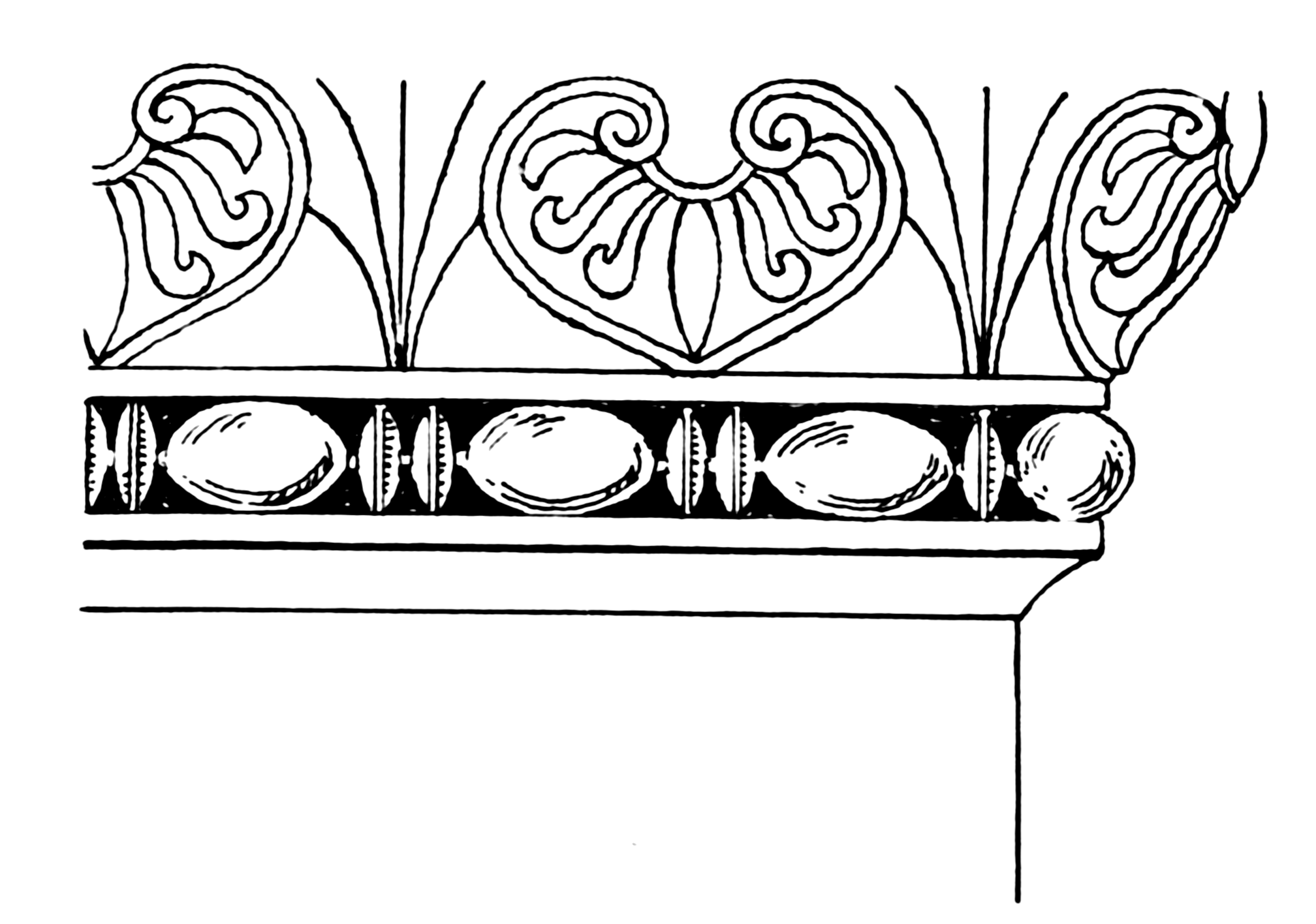 Astragal